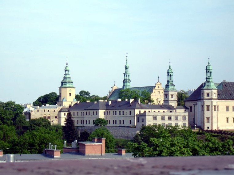 Pałac Biskupów Krakowskich w Kielcach pałac, 1637-41, ze skrzydłami 1720-46 baszta prochowa z obwarowaniem, XVII-XVIII ogród, XVII, 4 ćw. XX spichlerz, 1752